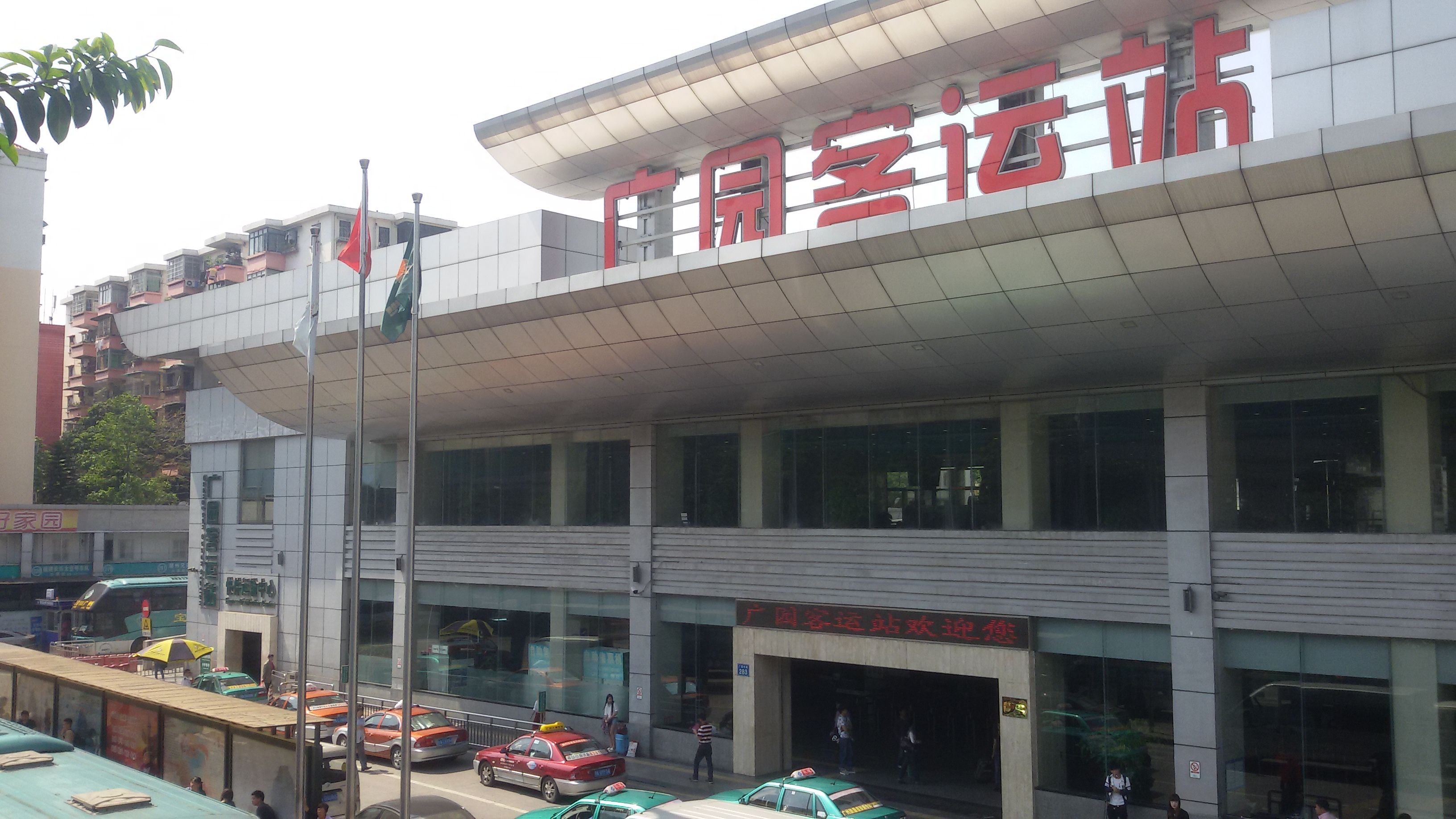 粵語: 广园客运站